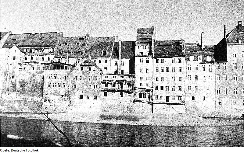 Original image description from the Deutsche Fotothek Görlitz. Uferbebauung neben der Dreiradenmühle